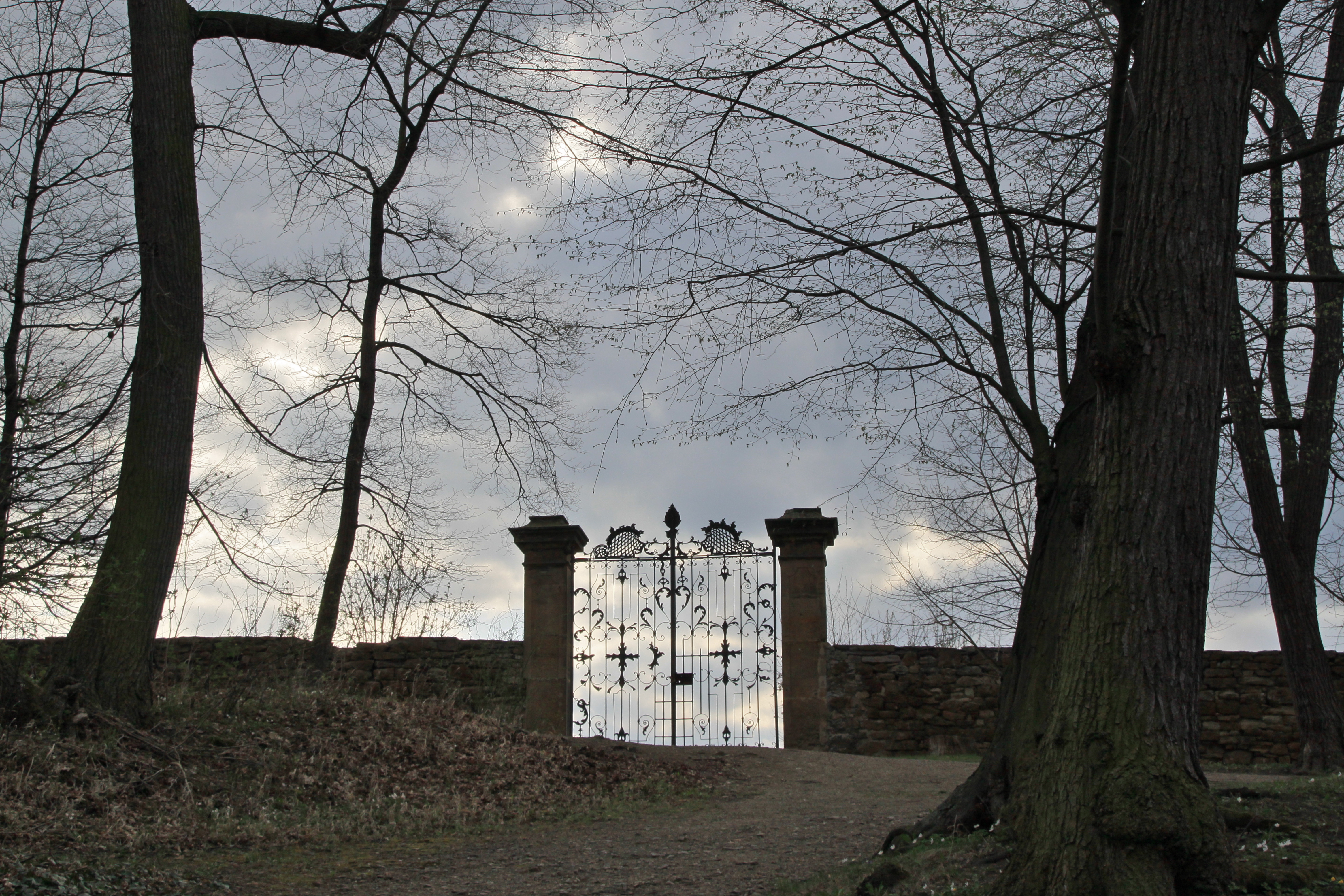 Gartenpforte an der Westseite des Molsdorfer Schlossparkes in dramatischem Licht. Molsdorf ist ein Ortsteil von Erfurt.